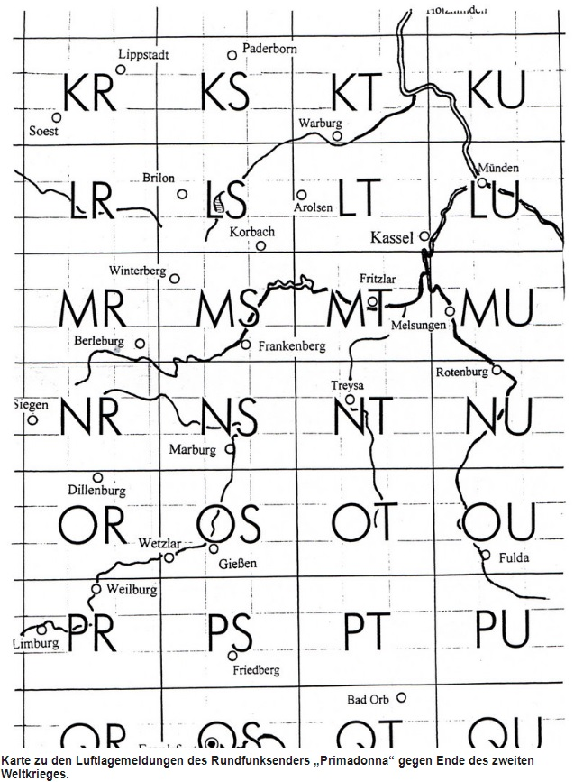 Drahtfunkkarte 2. Weltkrieg